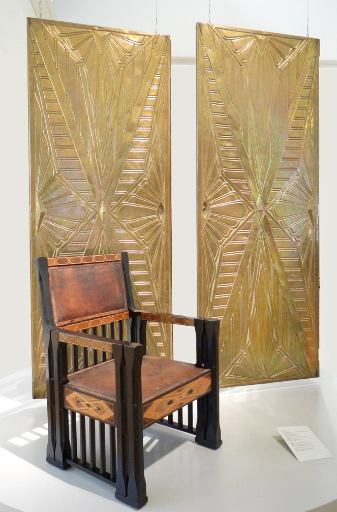 Au 1er plan, fauteuil du salon de musique, au 2ème plan, décors des portes du même salon de musique de la maison de Peter Behrens (1868-1940) 1901 Décors de porte en aluminium-bronze hauteur : 2,17m, largeur : 0,855 m Réalisation : H.E. Eggers, Hambourg